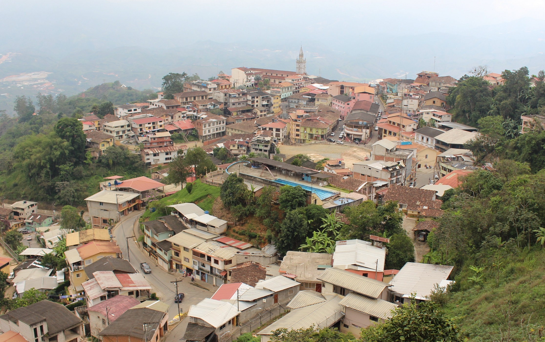 Zaruma, El Oro, 07 de febrero de 2017 (Andes).- El Santuario de la Virgen del Carmen, ícono religioso y turístico de Zaruma, está situado en la Plaza de la Independencia. Fue edificado entre los años 1912 y 1930, sobresale por su construcción en madera, donde resaltan los balcones y aleros artesonados y candelabros colgantes. ANDES/Danny Mera.